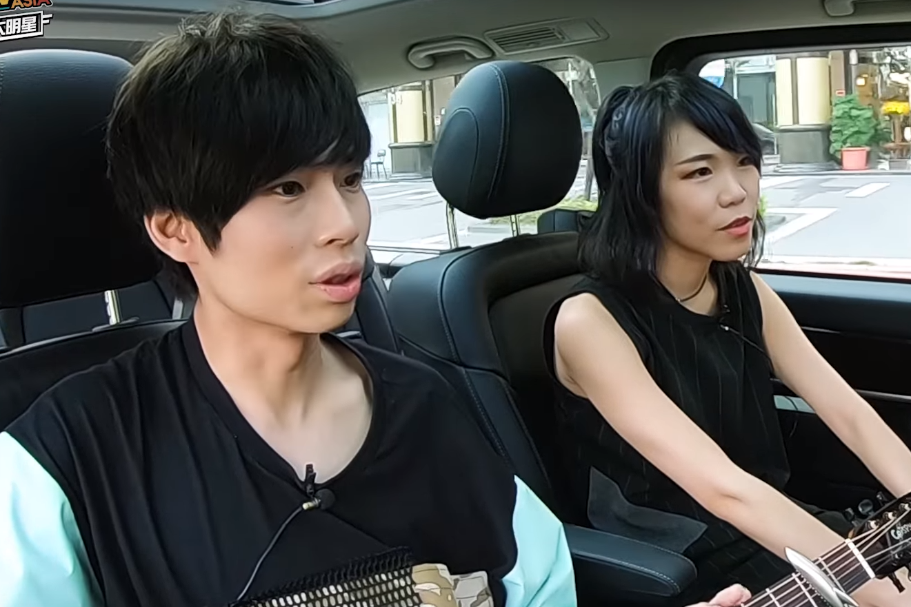 WebTVAsia 網羅大明星 #45 金曲最佳演唱入圍組合【Crispy脆樂團】